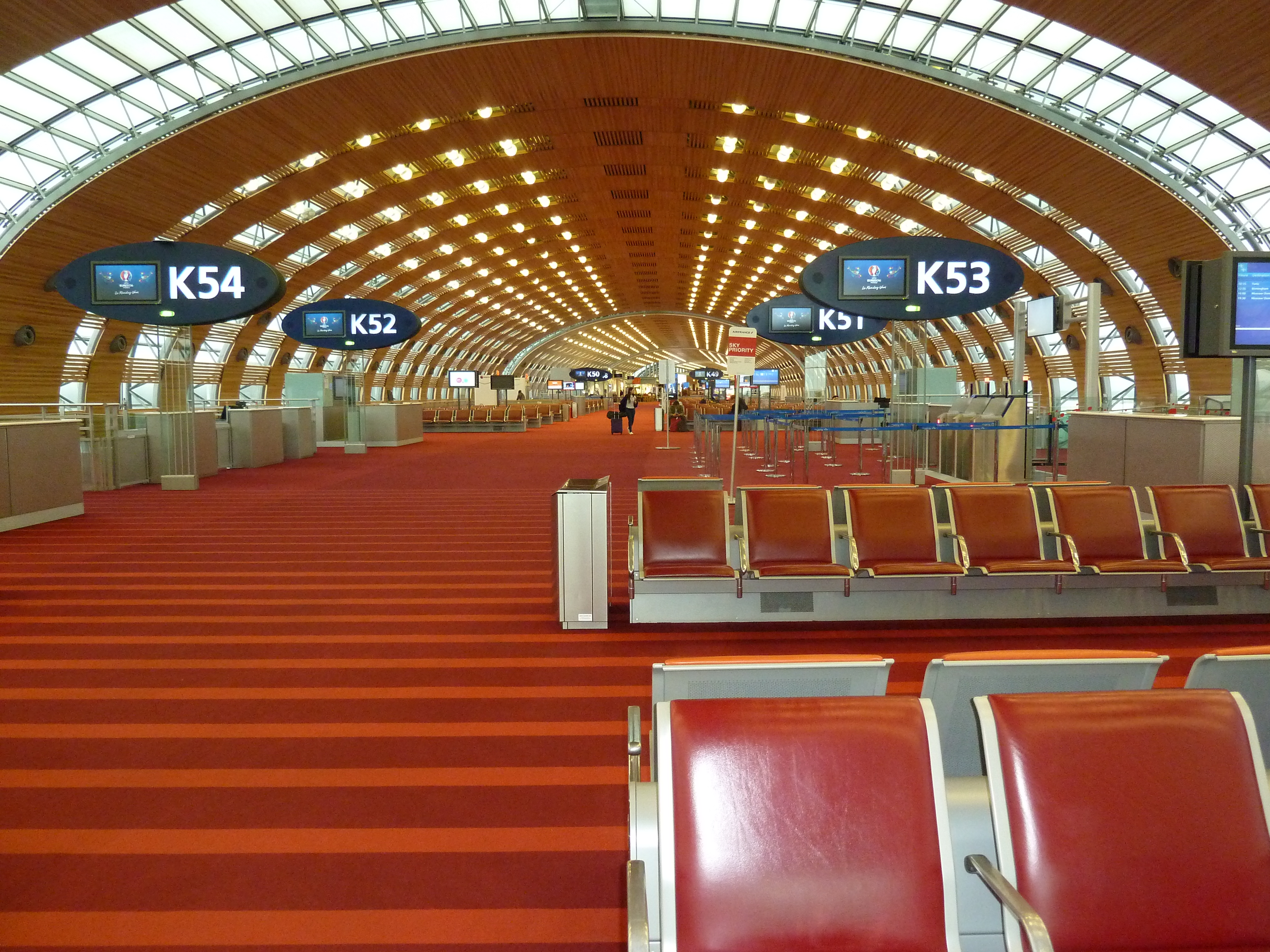 Hall K du terminal 2E de l'aéroport Paris Charles de Gaule